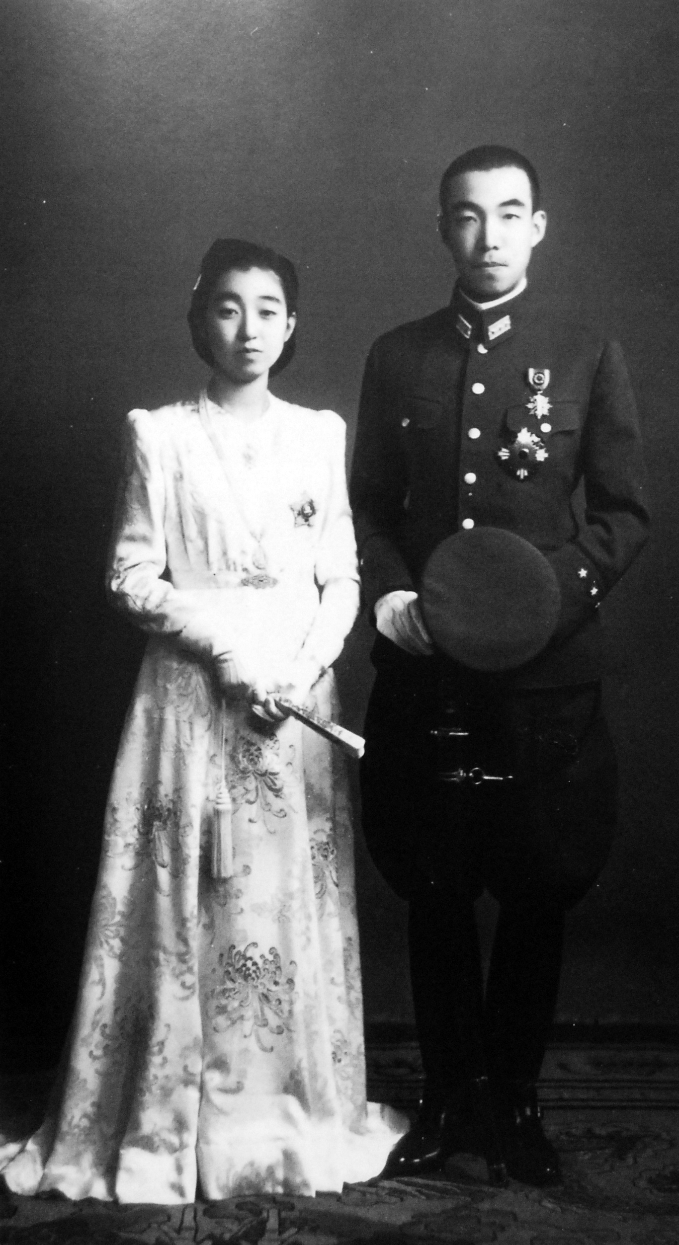 照宮成子内親王と盛厚王の結婚式。